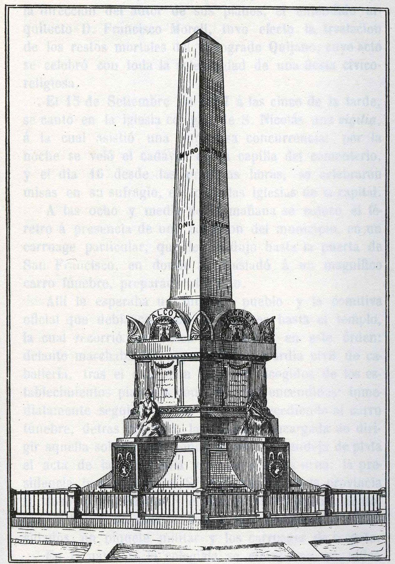 Un dibujo del mausoleo intercalado en las págs. 276-277 de la obra de Nicasio Camilo Jover "Reseña histórica de la ciudad de Alicante" (1863).